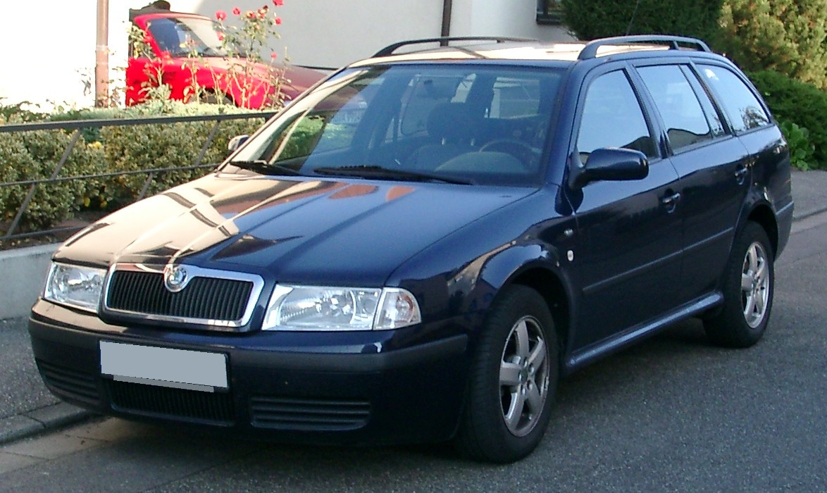 Škoda Octavia Kombi, 1. Generation